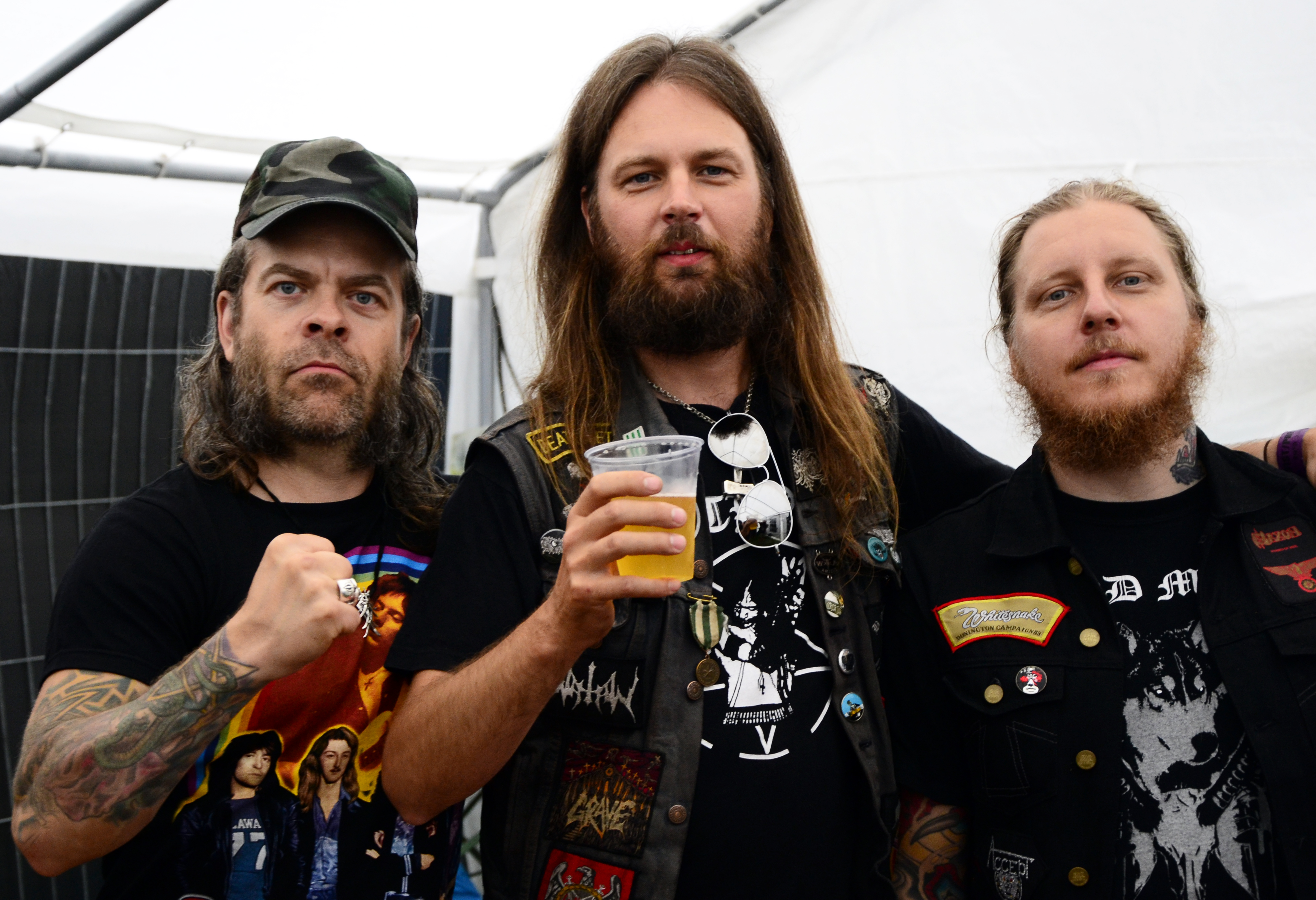 Grand Magus beim Headbangers Open Air 2014